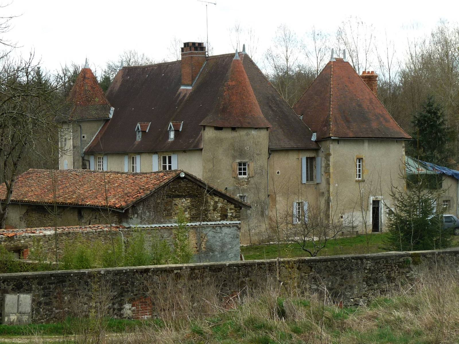 château de Chambes, Roumazières-Loubert, Charente, France